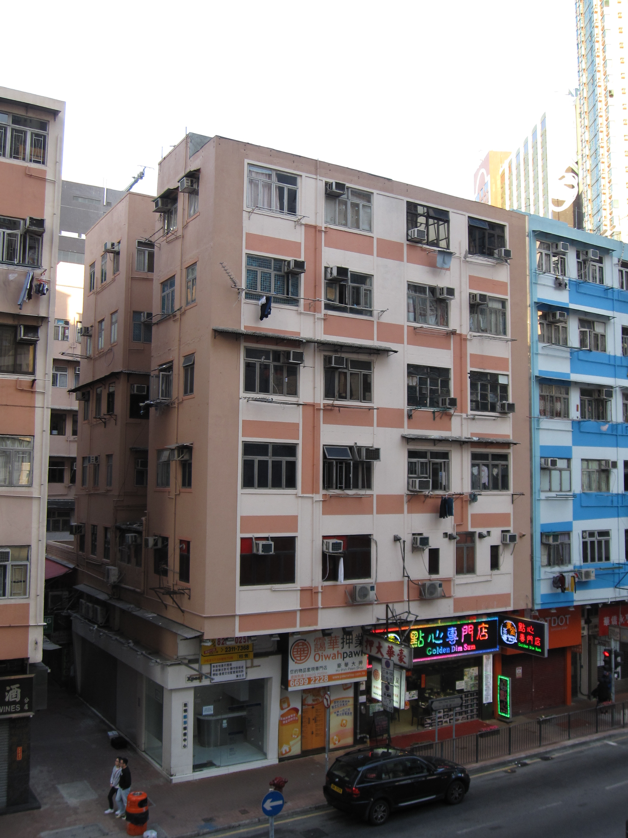 中文（香港）: 德仁樓第七期。